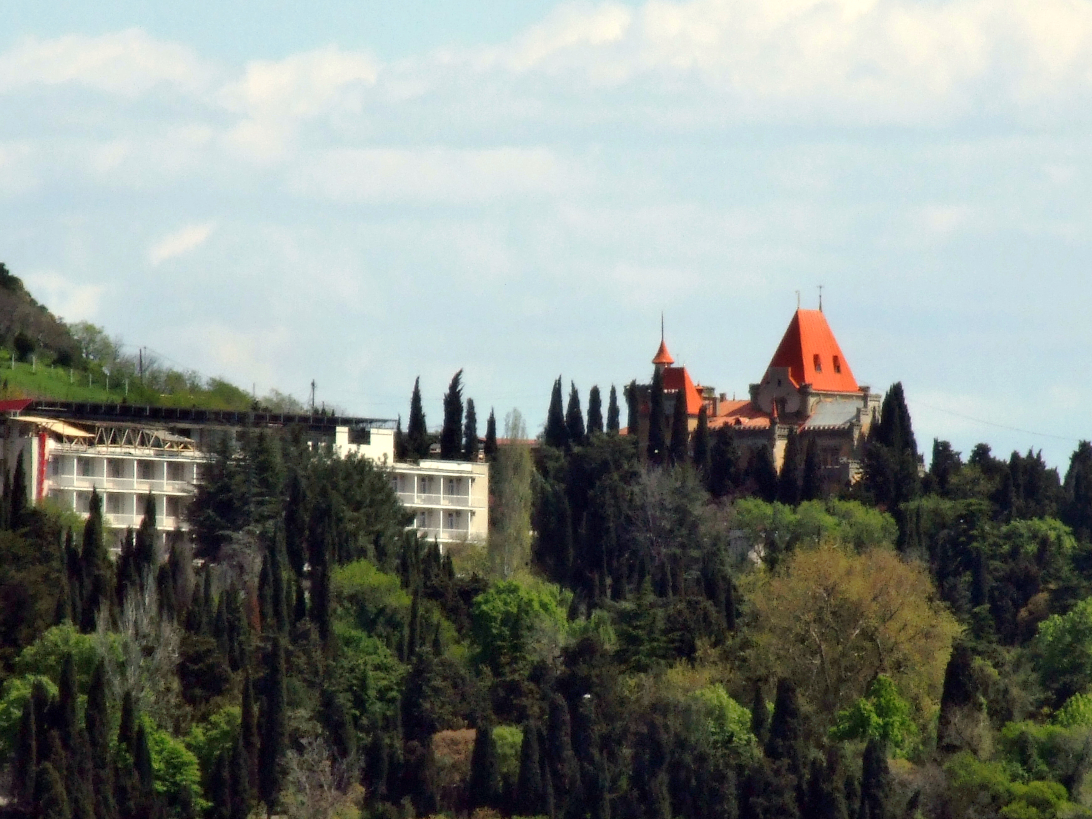 санаторий Утес